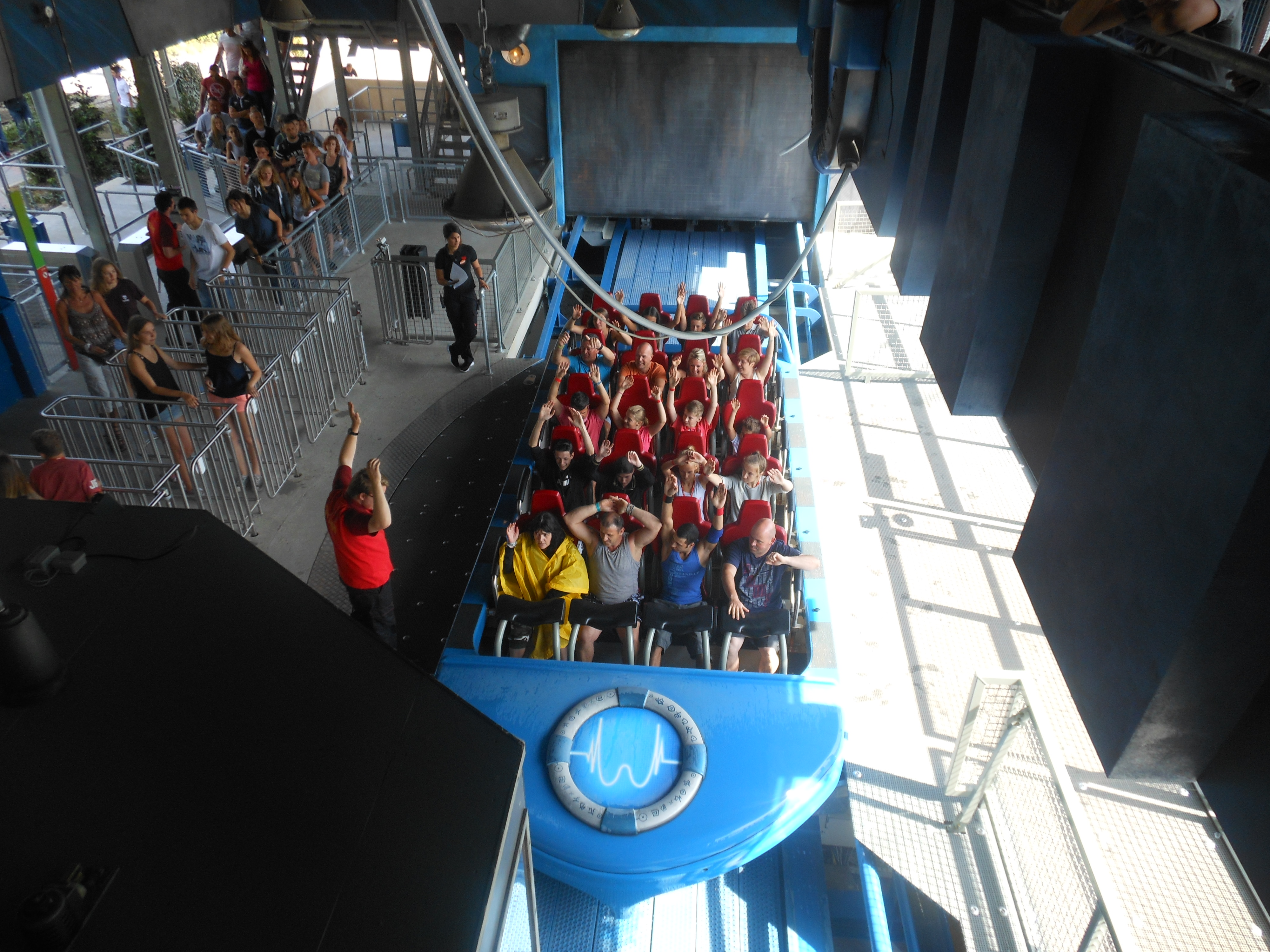 De boot van de elektrisch gelanceerde waterachtbaan Pulsar in Walibi Belgium, de eerste Power Splash ter wereld, gebouwd door Mack Rides. Het station maakt gebruik van een draaischijf om de boot te switchen tussen station en de baan.